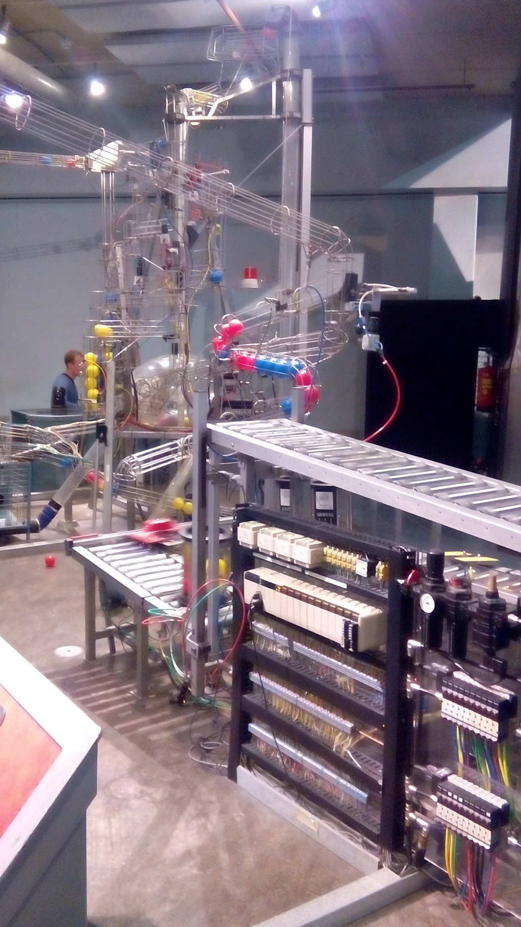 Exemplo de aplicación automatizada cun PLC de Omron en Nemo, Amsterdam.